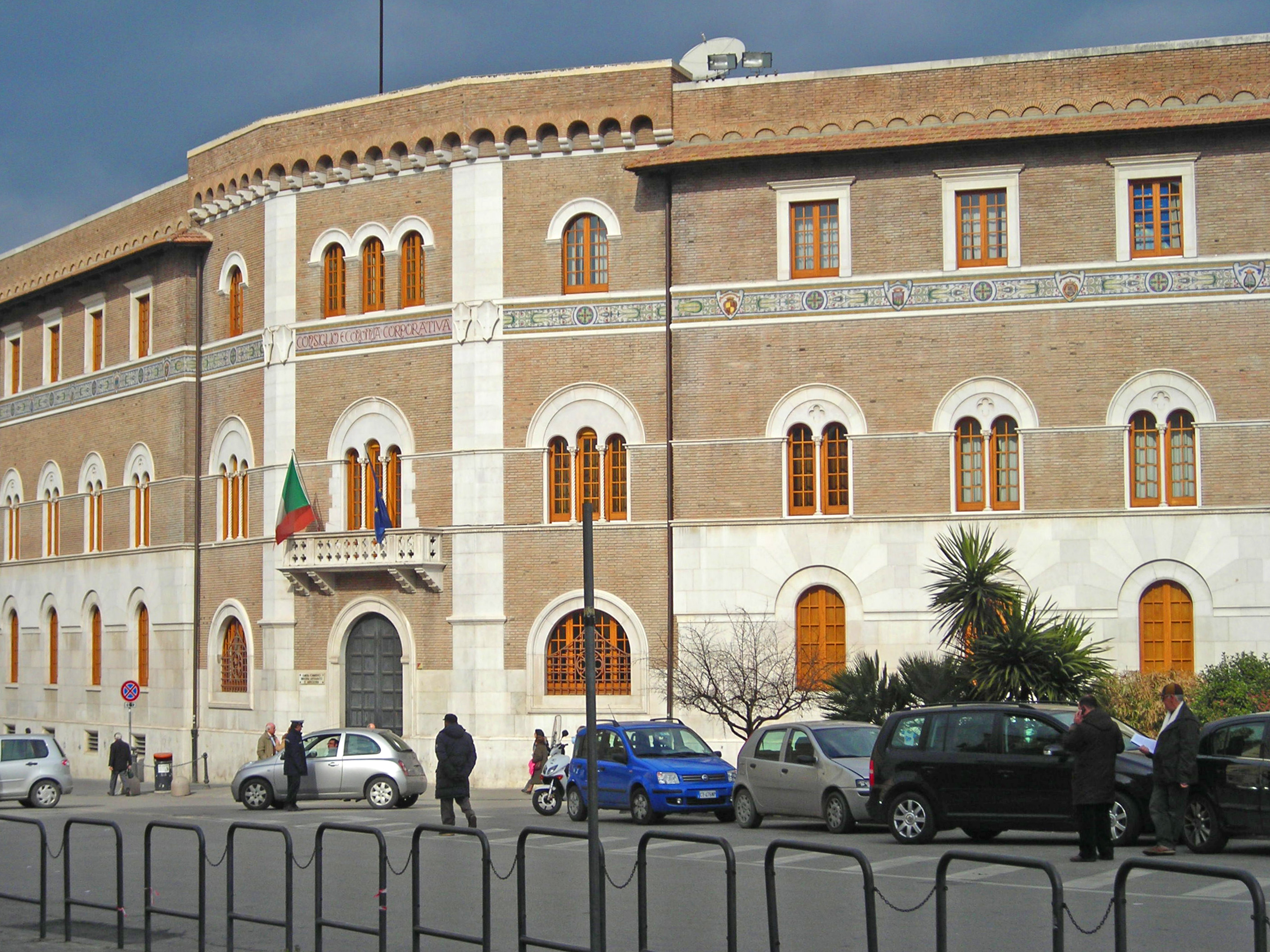 L'edificio della Camera di Commercio di Benevento